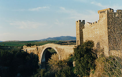 Photo du pont du castello Canino à Vulci (Italie)